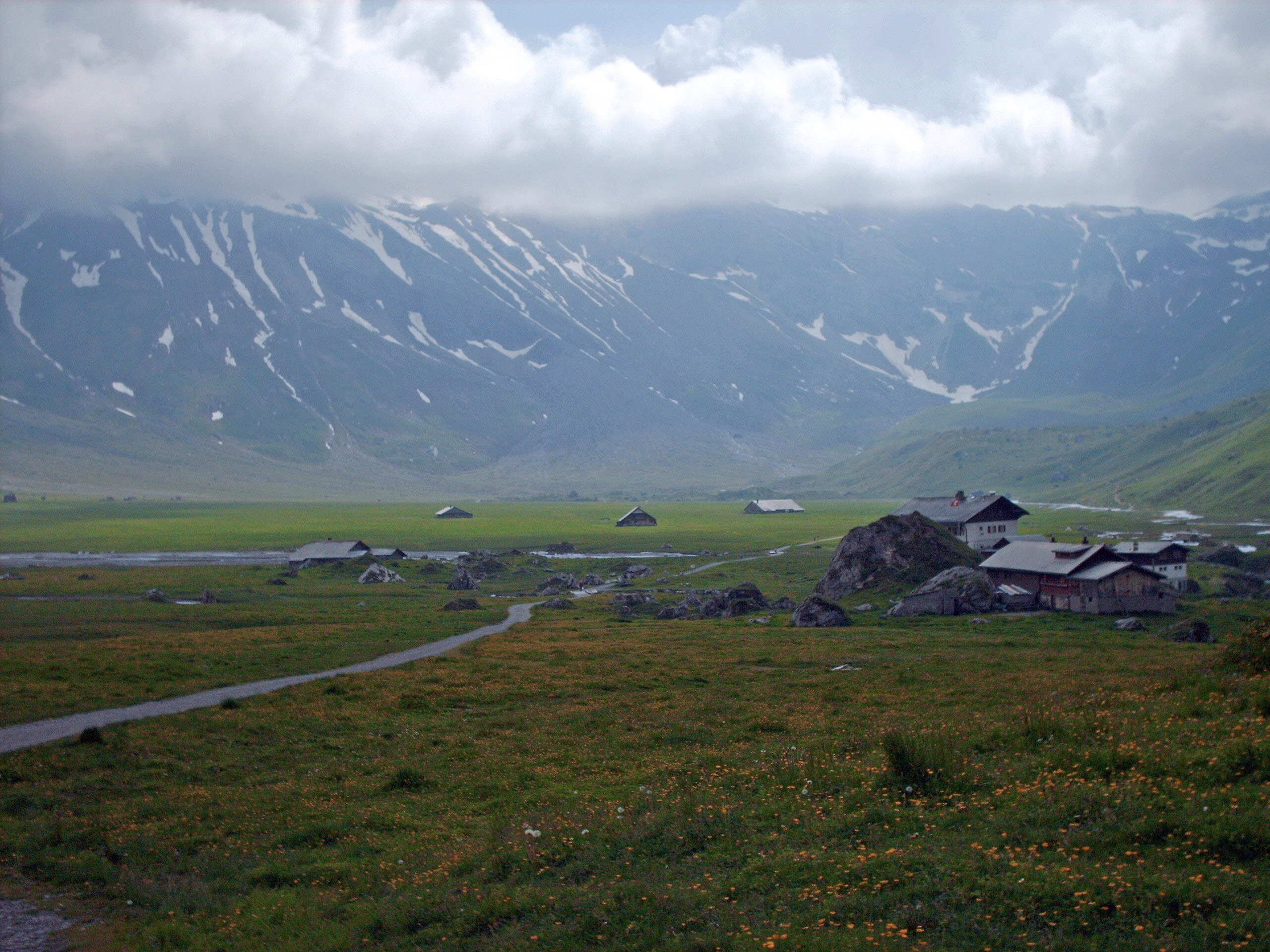 Engstligenalp